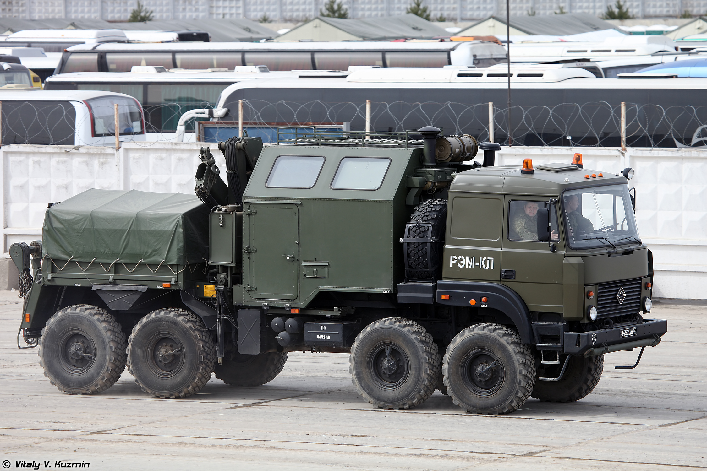 Ремонтно-эвакуационная машина колесная легкая РЭМ-КЛ (Wheeled repair and recovery vehicle REM-KL)